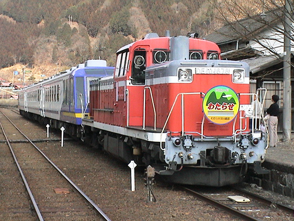 わたらせ渓谷鐵道「サロン･ド･わたらせ」